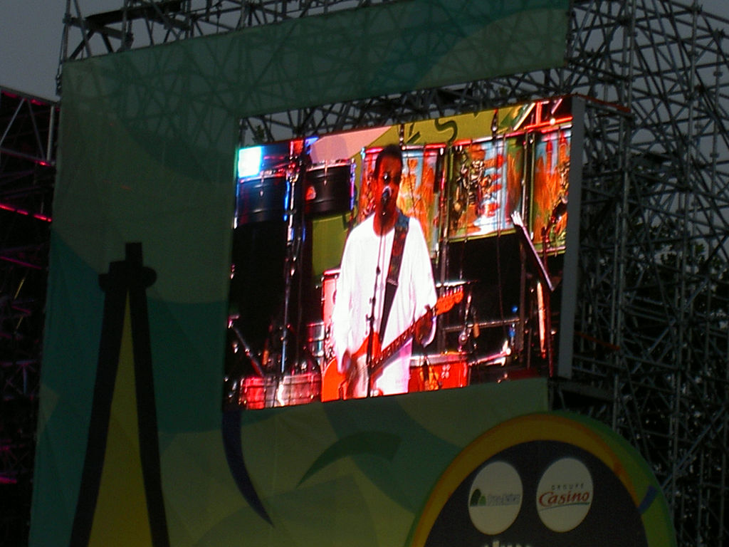 O cantor brasileiro Jorge Ben Jor, durante espetáculo em Paris, 2005.